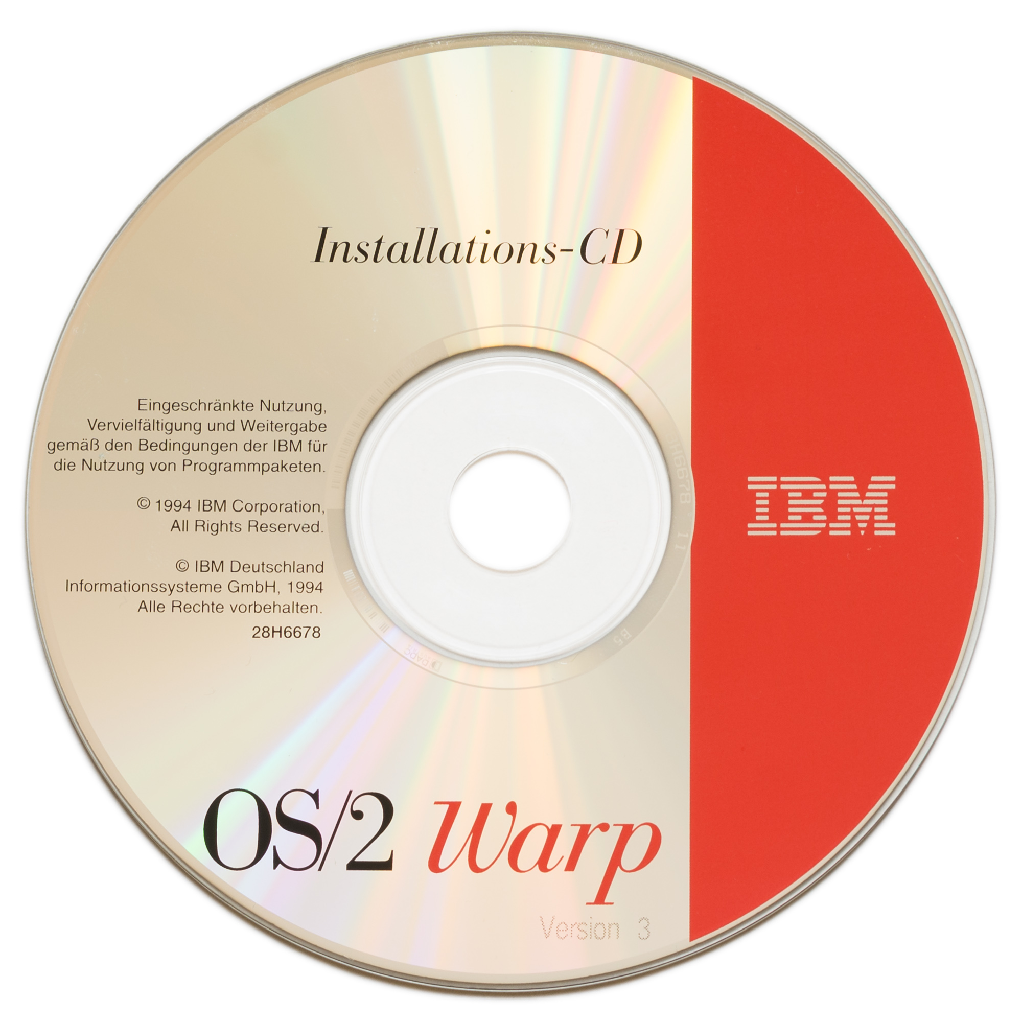 Installations-CD von OS/2 Warp 3.0 ohne Windows für Anwender, die bereits über eine Lizenz von Microsoft Windows verfügen